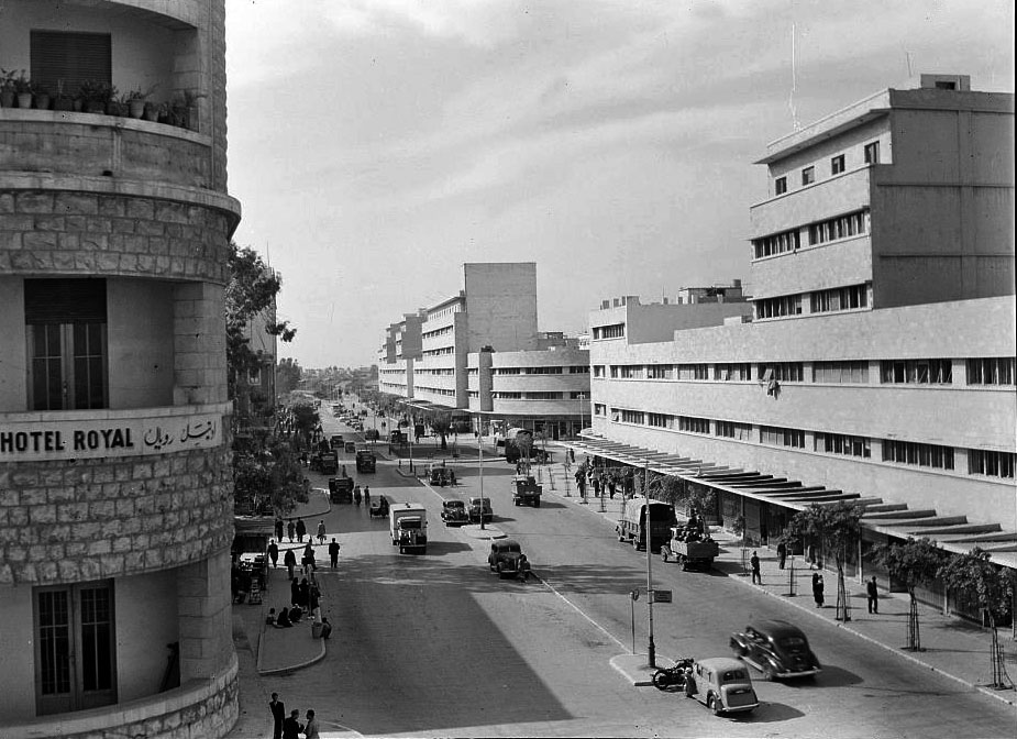 Kings Way in Haifa, between 1934 and 1939 רחוב המלכים בחיפה , היום דרך העצמאות. בין השנים 1934-1939